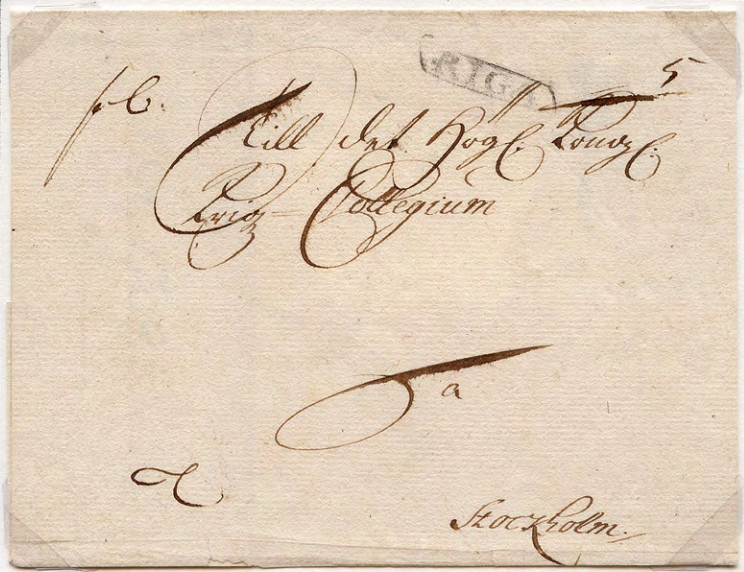 Почтовый конверт, отправленный из Риги в Стокгольм.